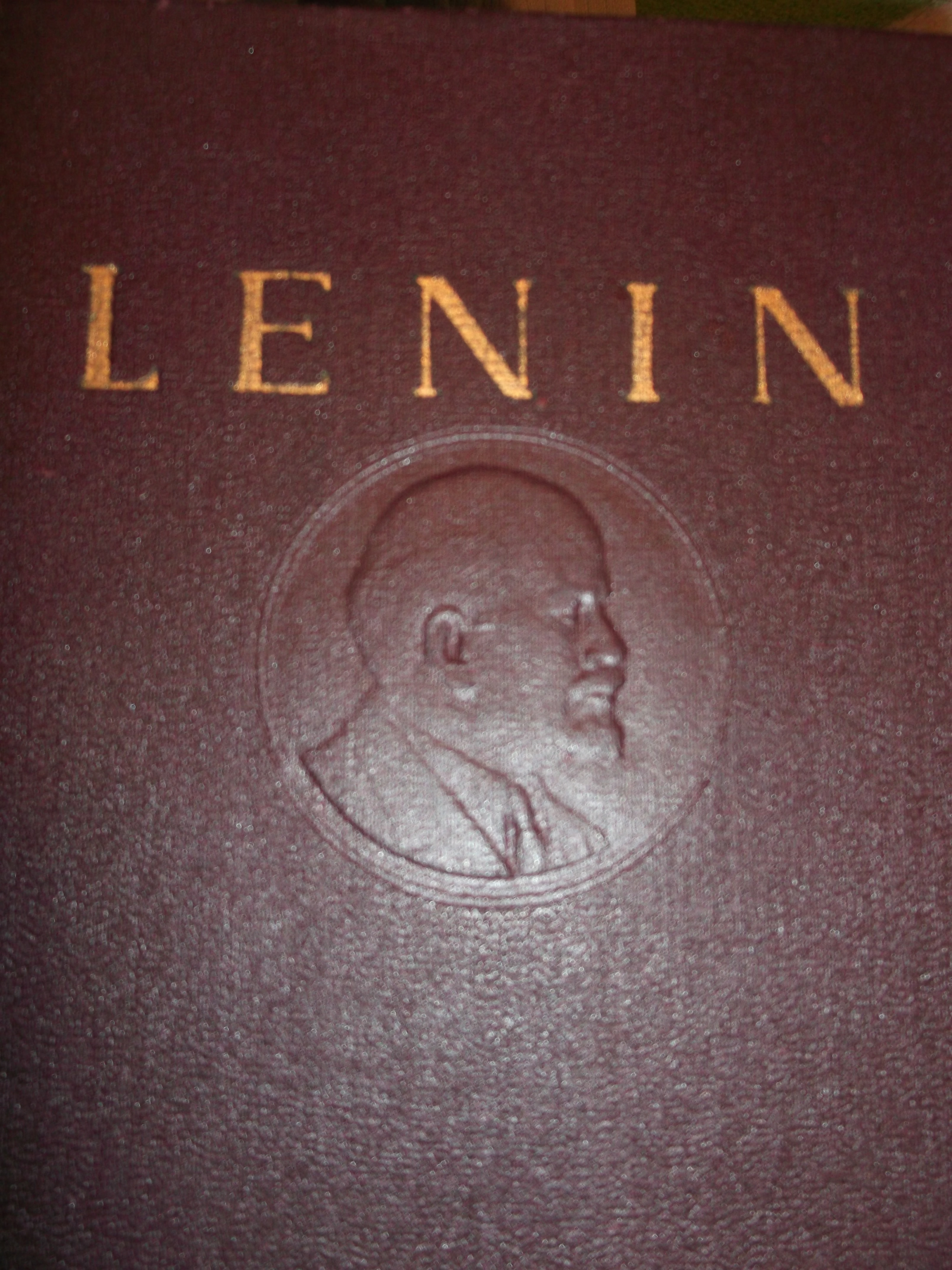 Coperta - Opere ,Vladimir Ilici Lenin ,vol.30 - Bucuresti ,1956.